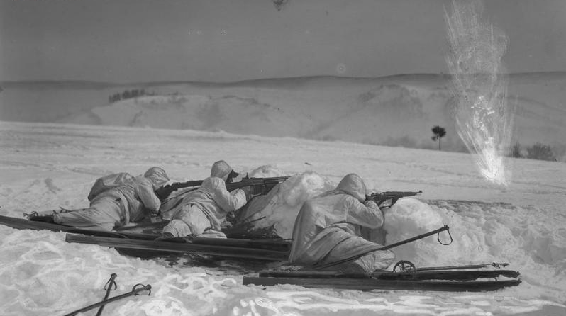 Żołnierze polscy w zimowym umundurowaniu maskującym na stanowisku ręcznego karabinu maszynowego 7,92 mm Browning wz. 28. Żołnierze uzbrojeni w karabiny Mauser 7,92 mm wz. 29.